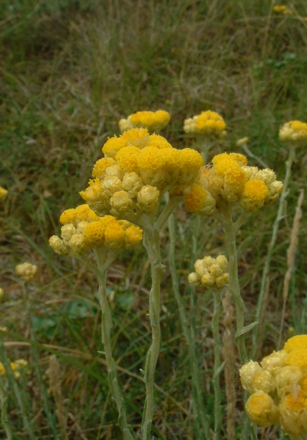 Immortelle stoéchas, Talmont-Saint-Hilaire.